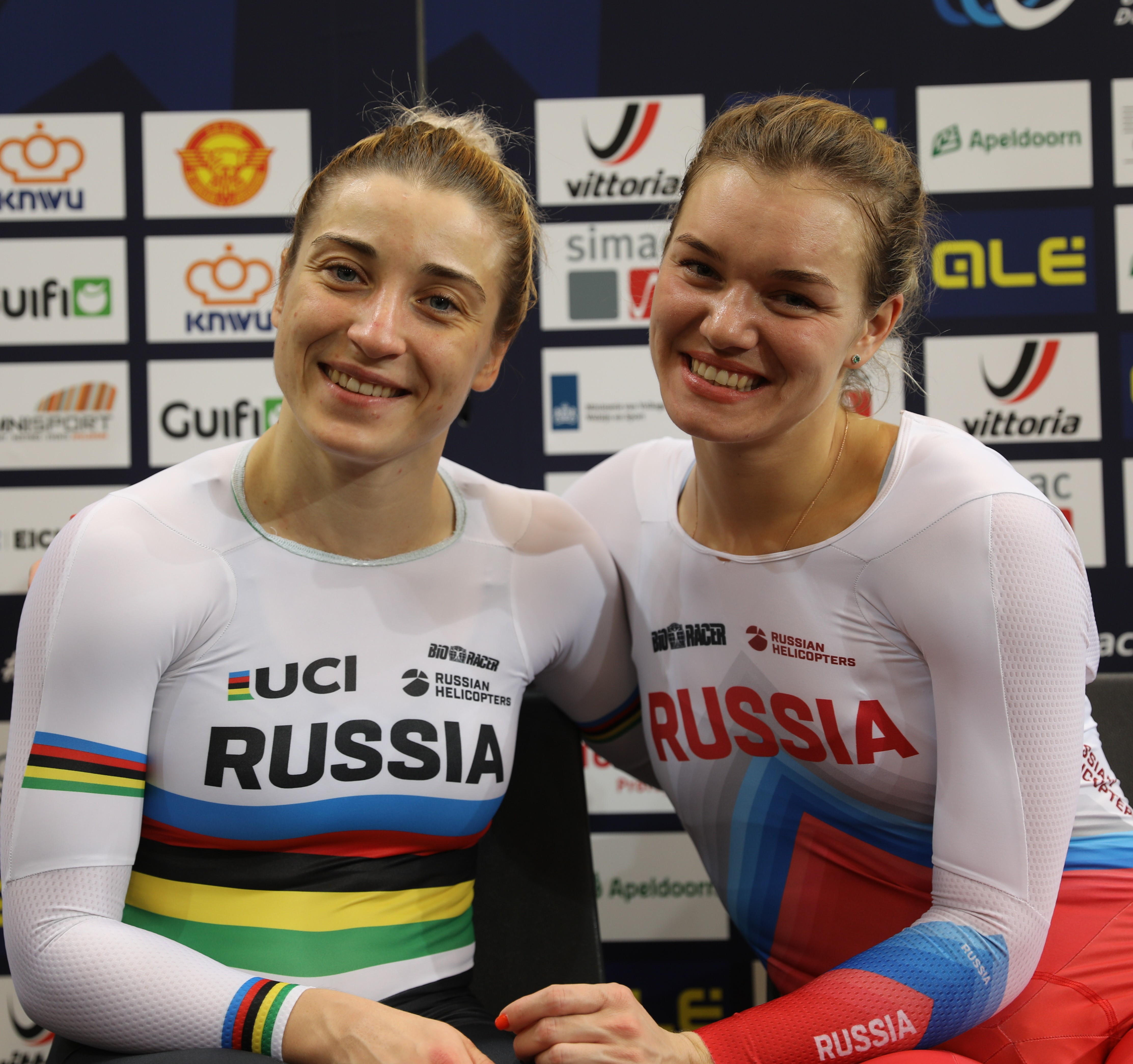 Daria Shmeleva (l.) und Anastasiia Voynova, russische Radsportlerinnen